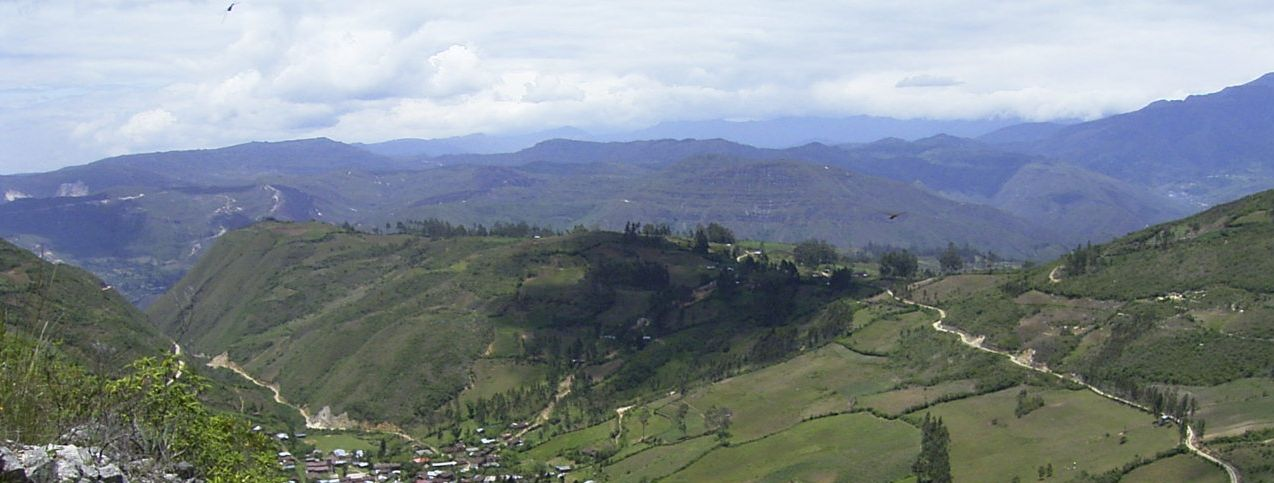 el pueblo Soloco, Provincia de Chachapoyas, Amazonas, Peru.